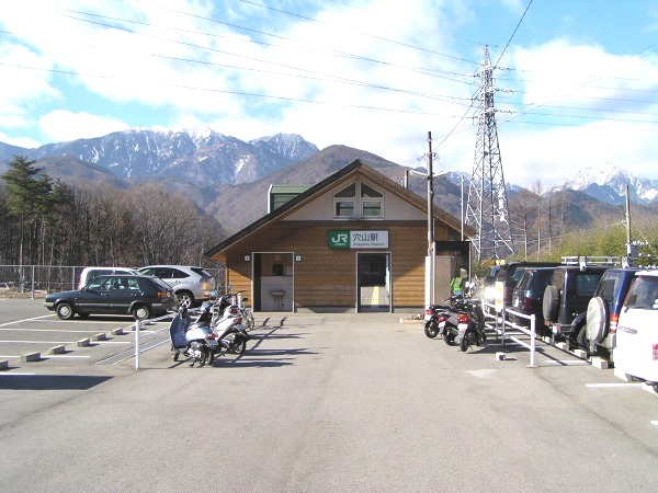 穴山駅 2005年12月20日に投稿者が撮影 とてもよく晴れた日でありました。駅舎の後ろにきれいに見えていた山々を写真に入れるため少し遠ざかって撮影してみました。